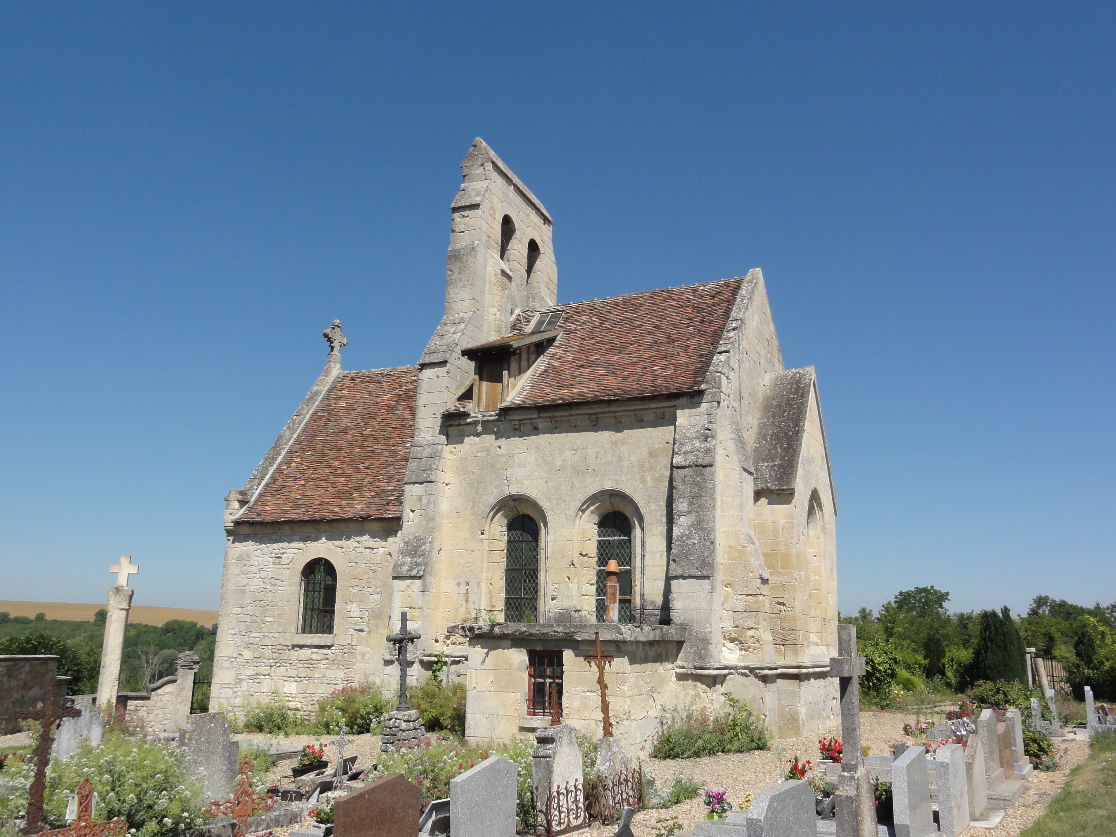 Merval (Aisne) église